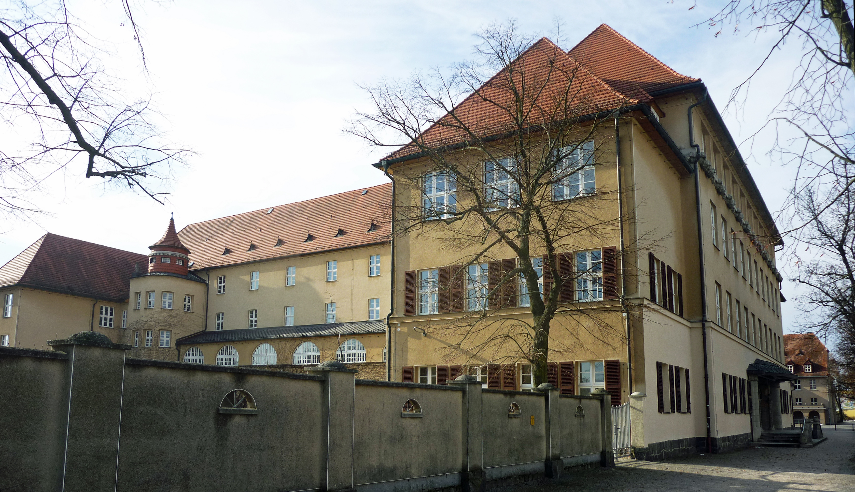 Sängerstadt-Gymnasium Finsterwalde